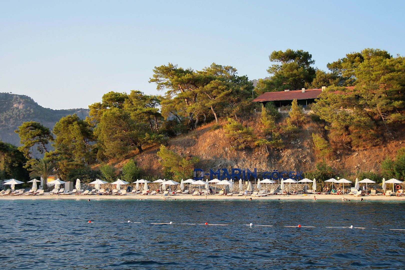 Göcek